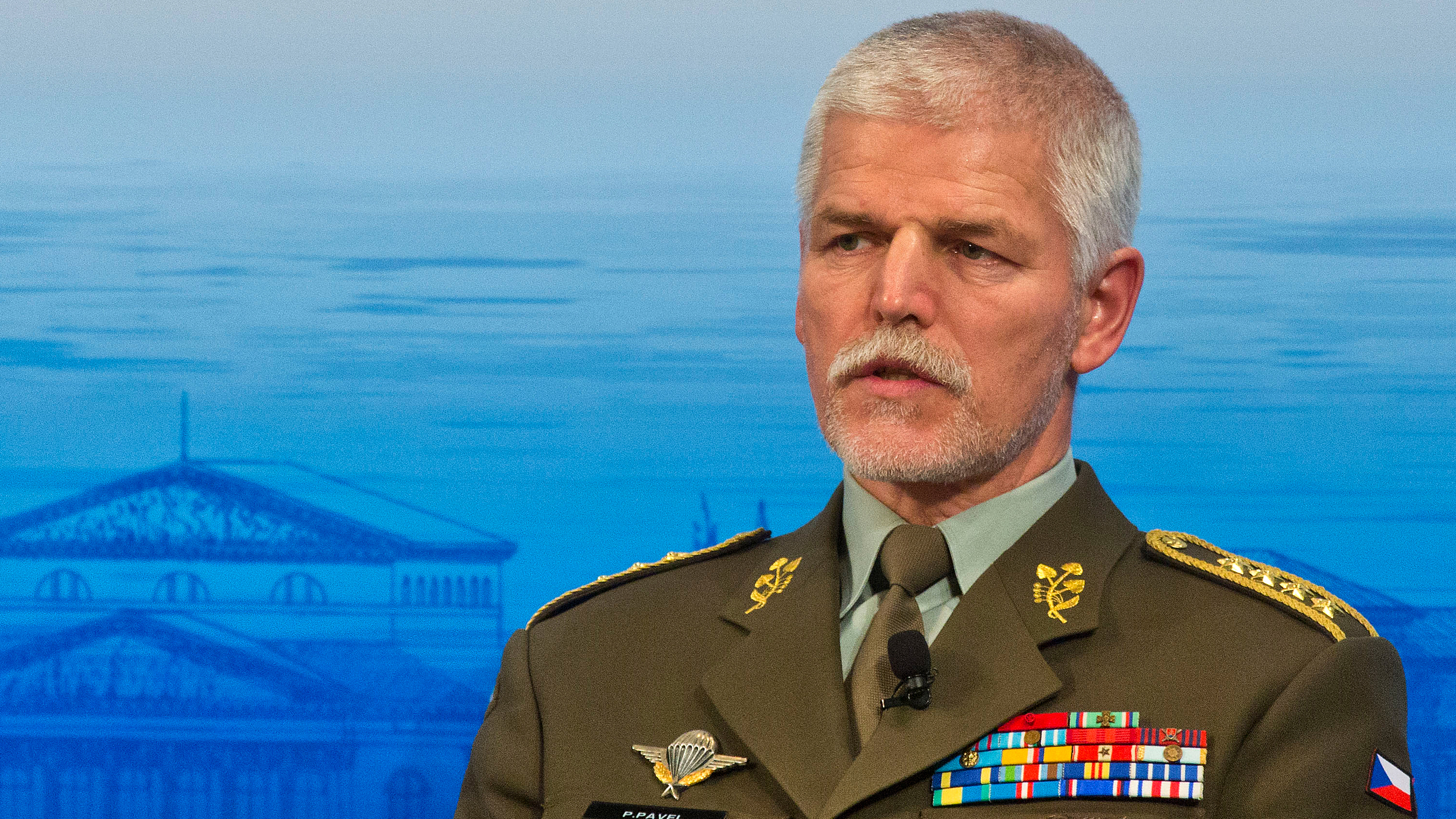 Petr Pavel während der Münchner Sicherheitskonferenz 2016